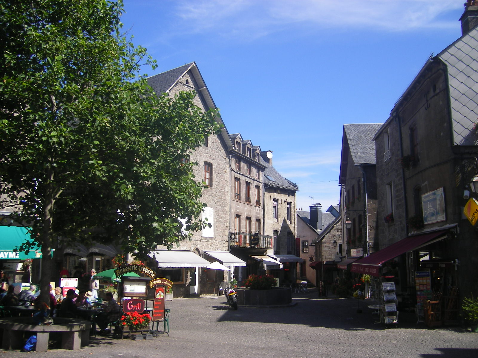 Besse-et-Saint-Anastaise